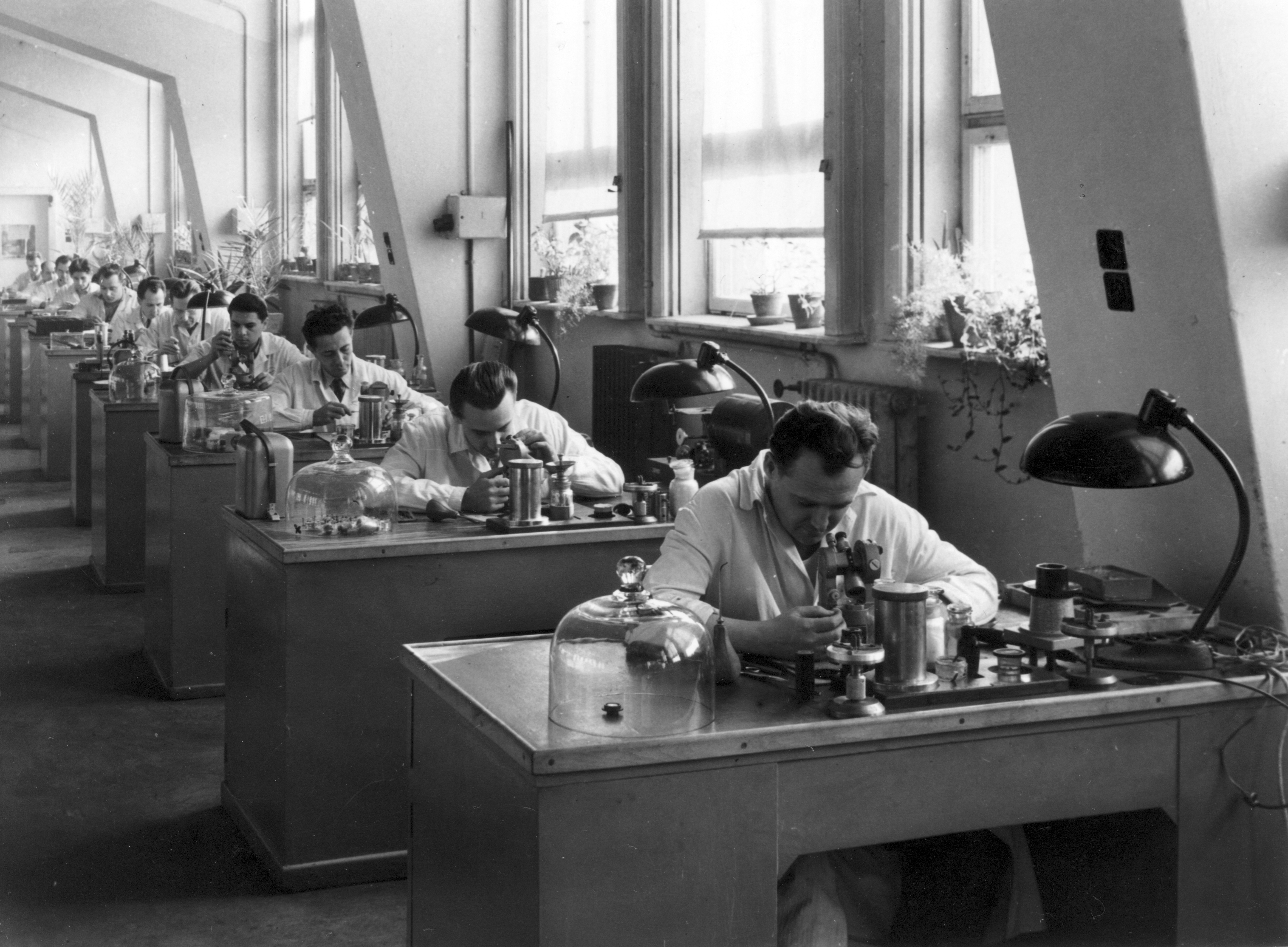 A „Gamma” Műszaki Részvénytársaság egy magyarországi vállalat a XI. Fehérvári úton. A képen annak szereldéje látható.